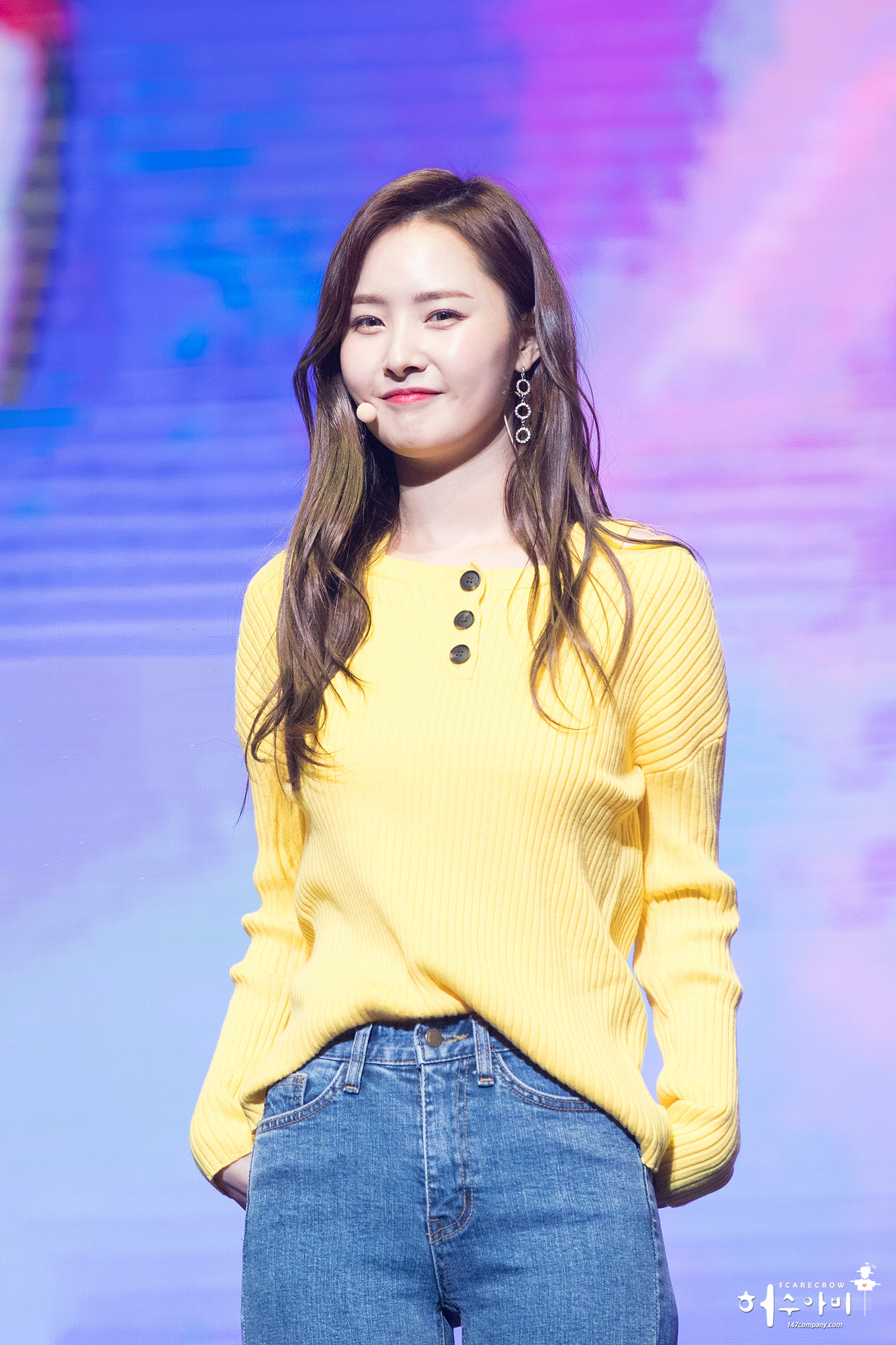 [18.03.03] 유니티 팬미팅 직찍 ( 유니티 더유닛 우희 윤조 )